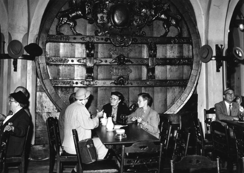 Im Ratskeller in Bremen